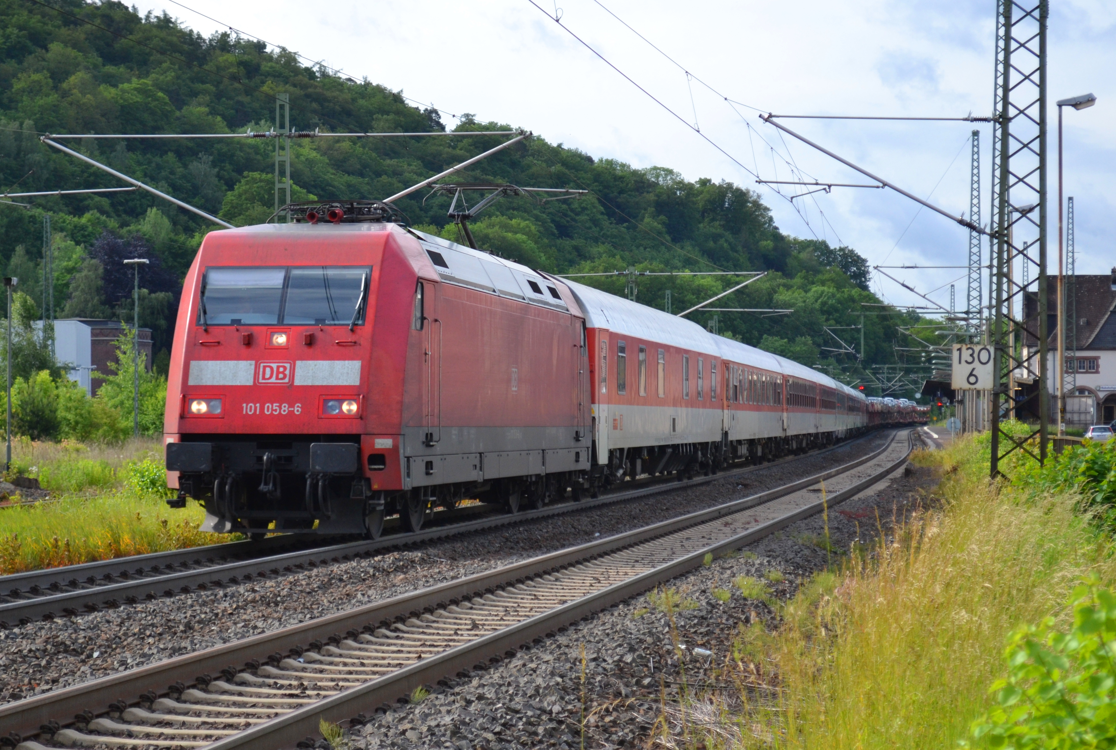 Der Autoreisezug AZ 1357 bei der Durchfahrt in Herborn. Dieser Zug verkehrt im Sommer 2012 für einige Wochen immer Freitag Morgens auf der Strecke.